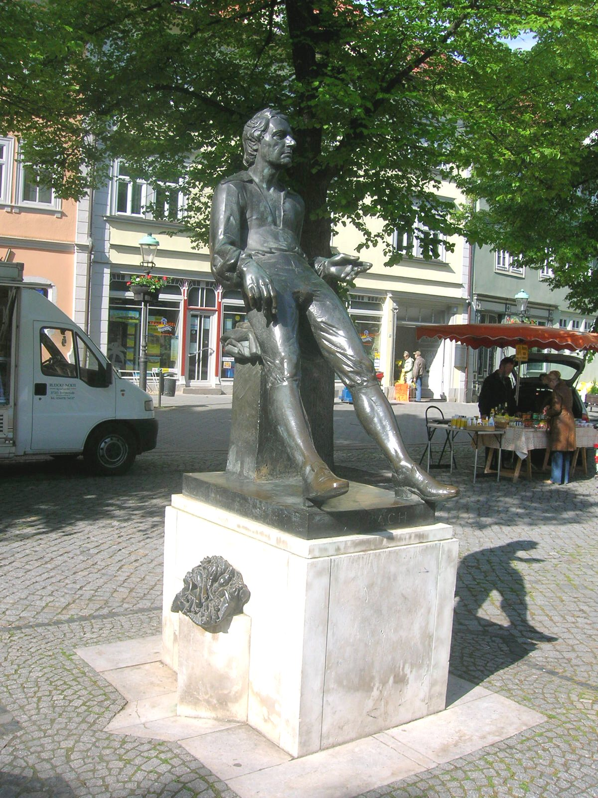 Arnstadt in Thüringen, Denkmal für Johann Sebastian Bach auf dem Markt, Bildhauer: Bernd Göbel, 1985